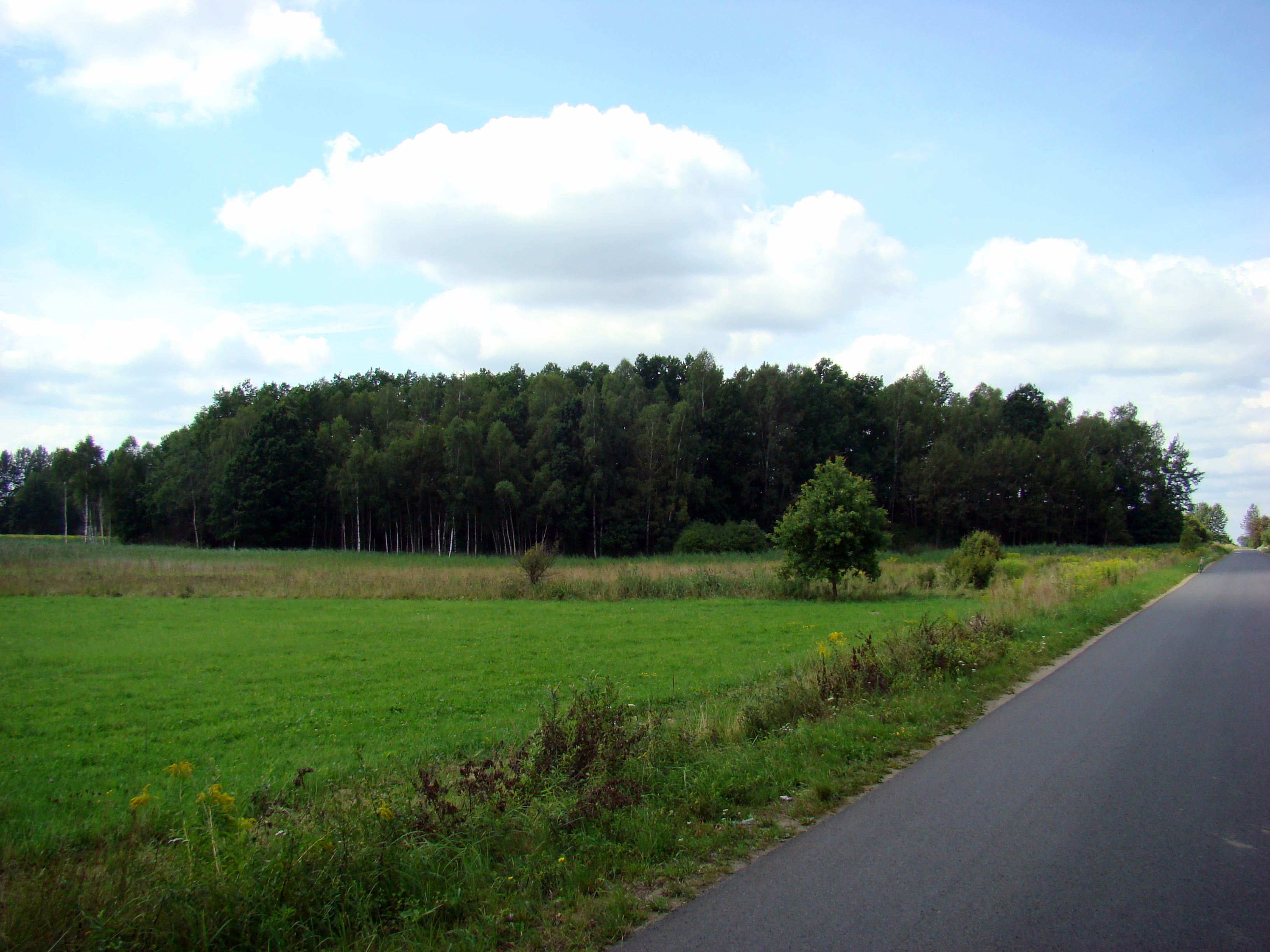 Hałda kopalni rud żelaza "Huta Nowa" w Poczesnej.